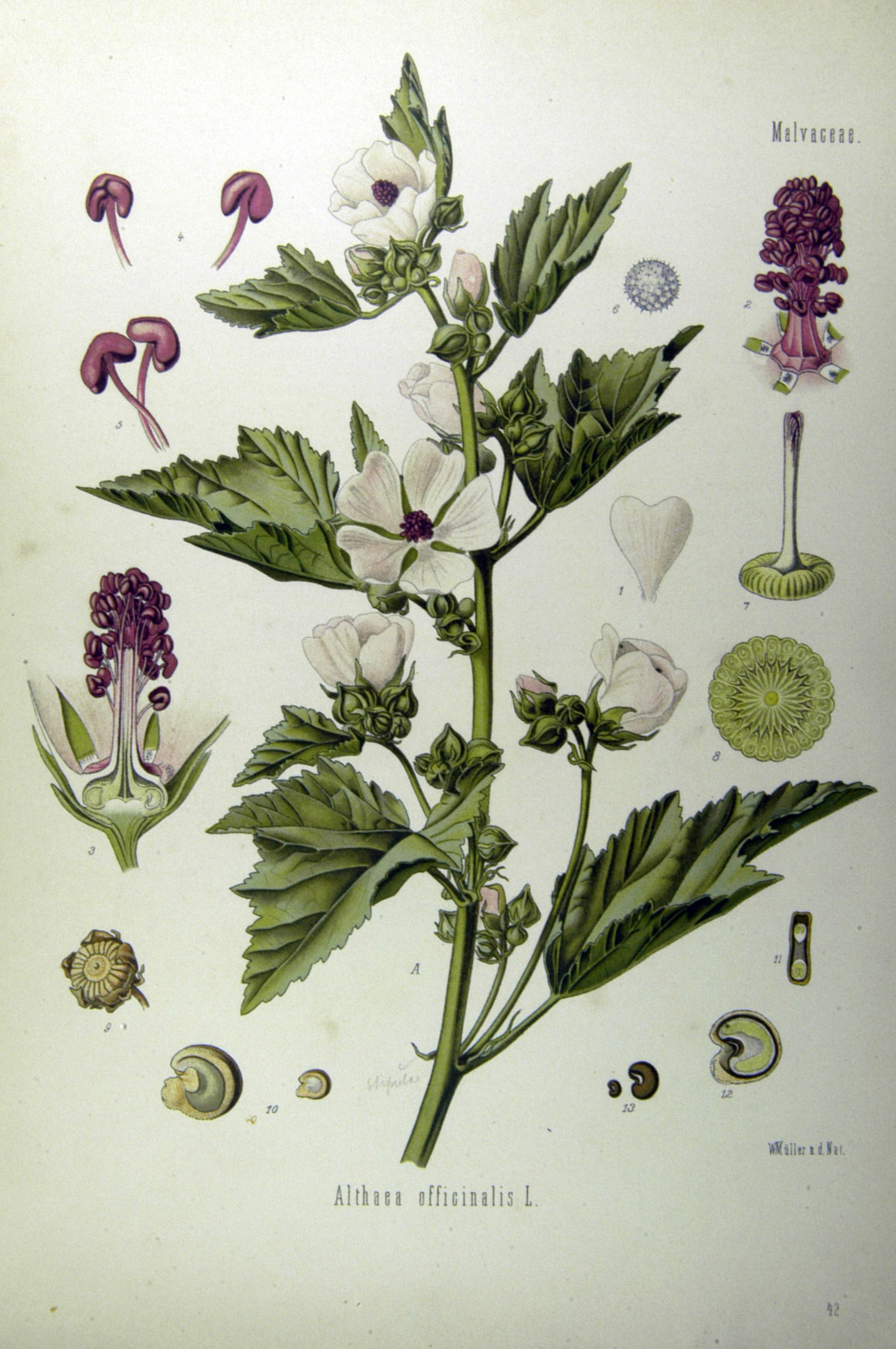 Planche botanique n° I-42 de l'"Atlas des Plantes médicinales de Köhler en images réalistes avec brèves notes explicatives" consacrée à la guimauve.